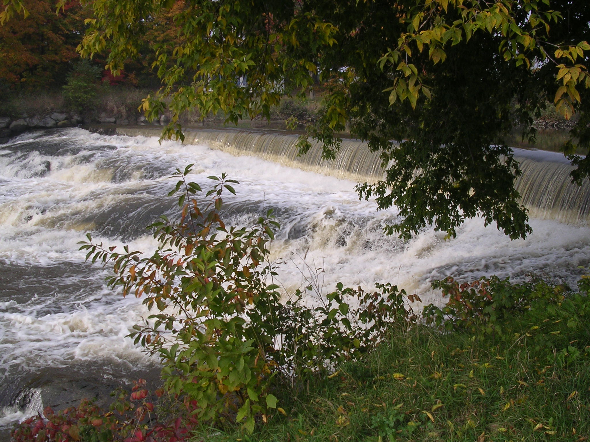 Barrage du Moulin Goulet, situé sur la rivière des Envies à Saint-Stanislas (Mauricie, Québec). Moulin à eau; moulin à farine; meunerie; moulin à scie.